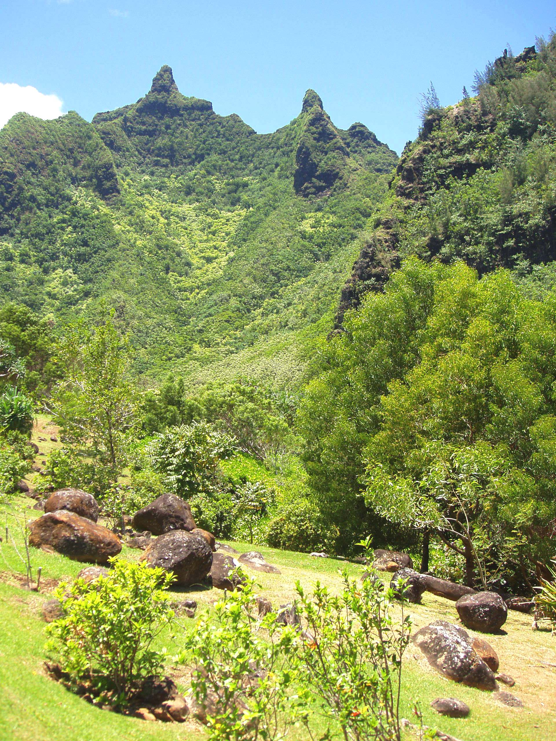 Limahuli Garden and Preserve, Kauai, Hawaii - general view.